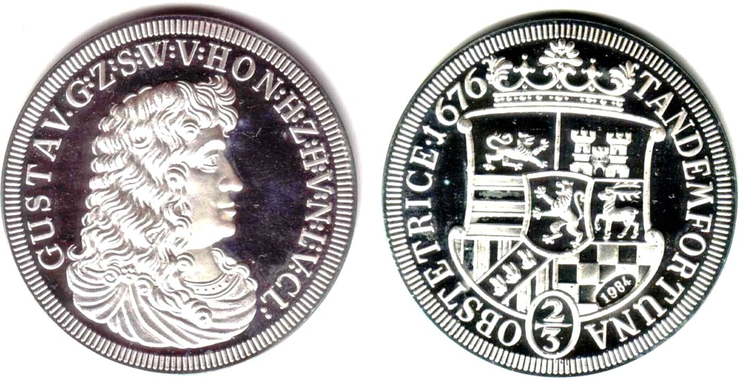 Replik eines 2/3-Talers Gustav Graf zu Sayn-Wittgenstein-Hohenstein aus dem Jahr 1676